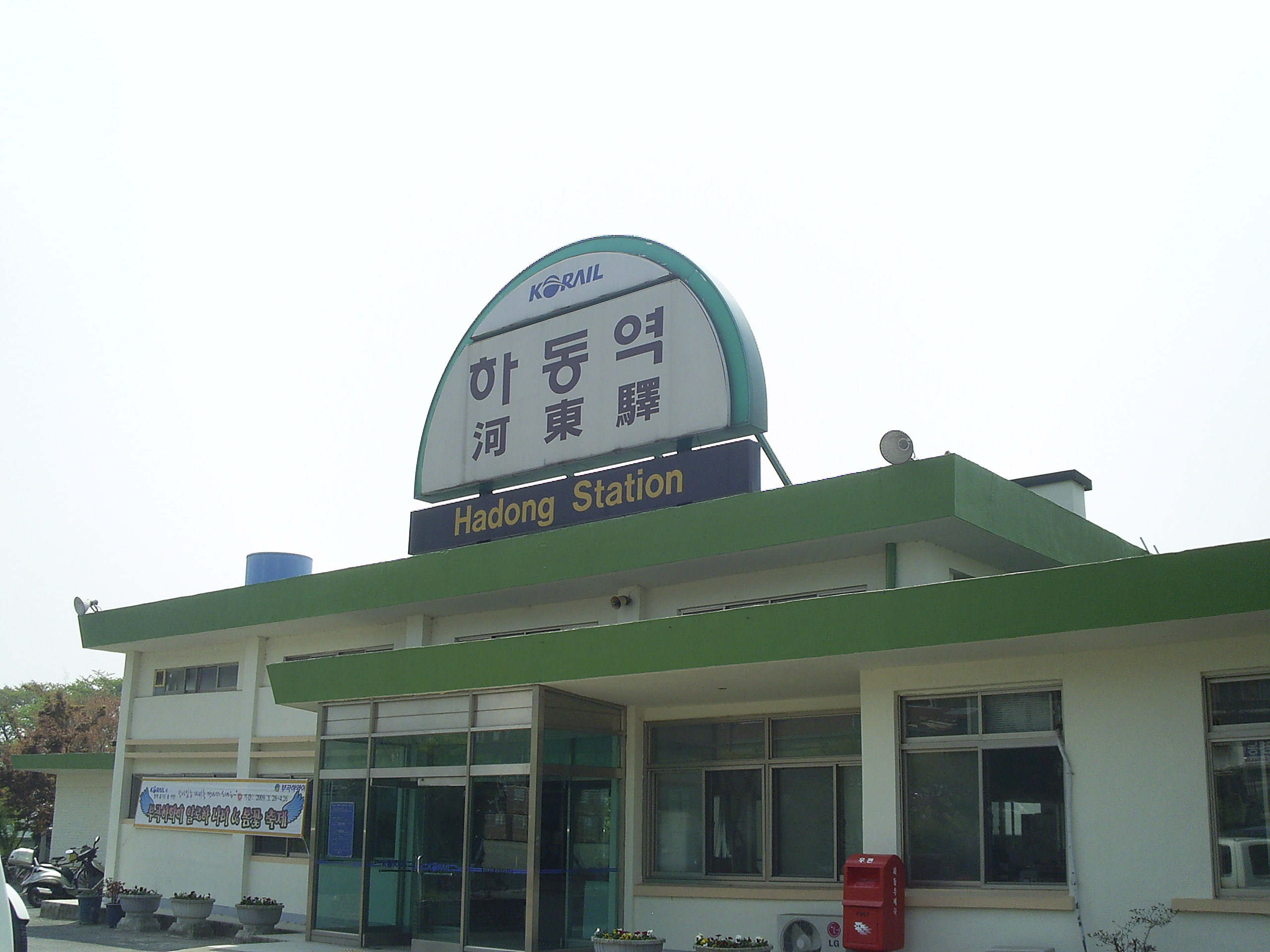 하동역 역사. 2009년 4월 12일 촬영